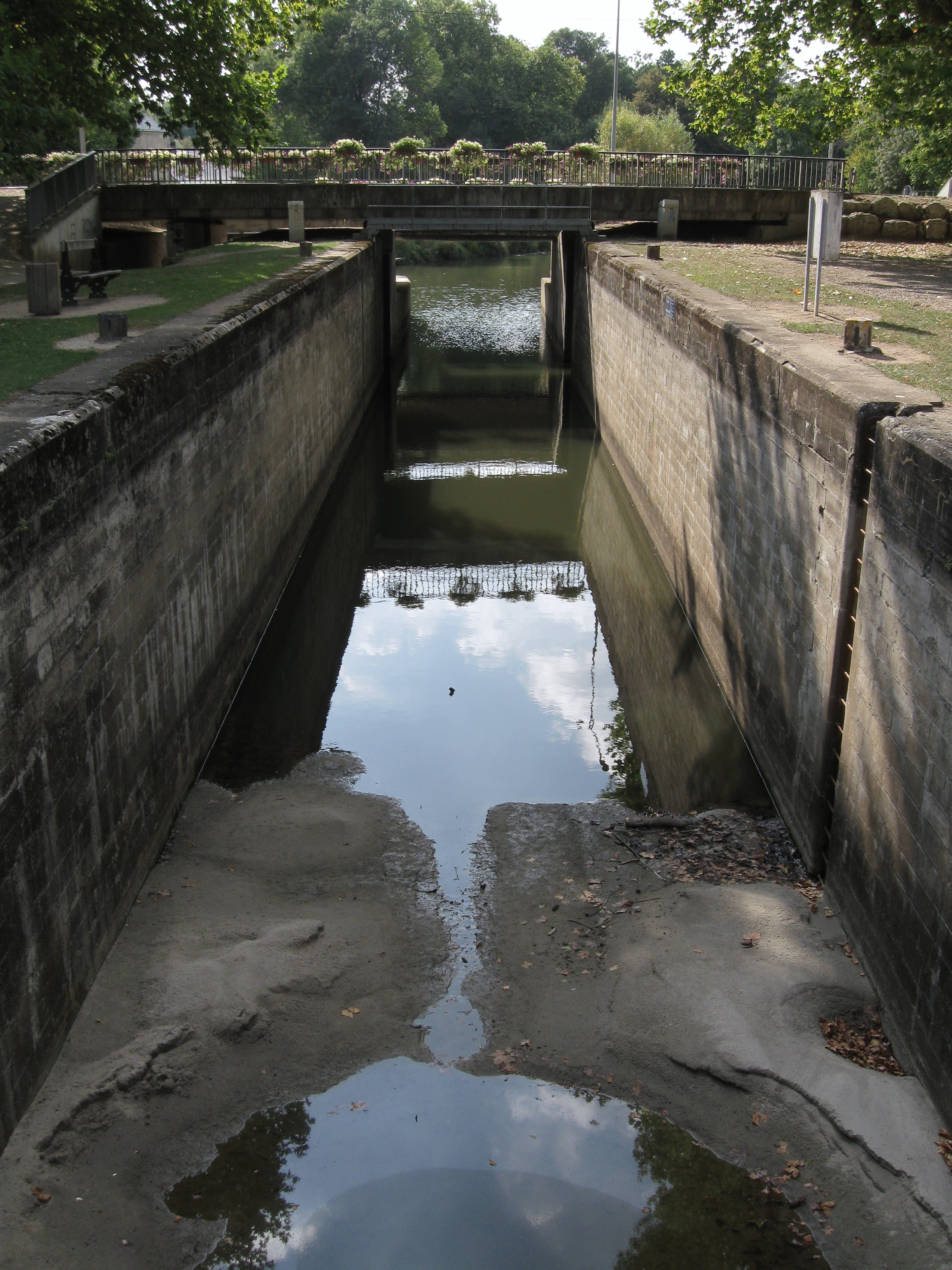 L'écluse de Pont-aux-Moines sur le canal d'Orléans, Mardié, Loiret, France